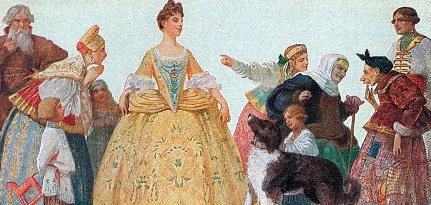 "Эко чучела!"